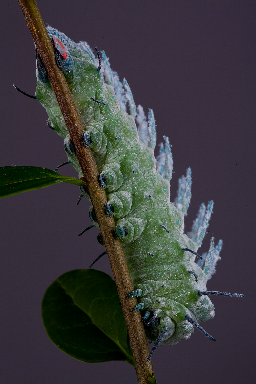 4 Raupenstadium des Attlasspinners